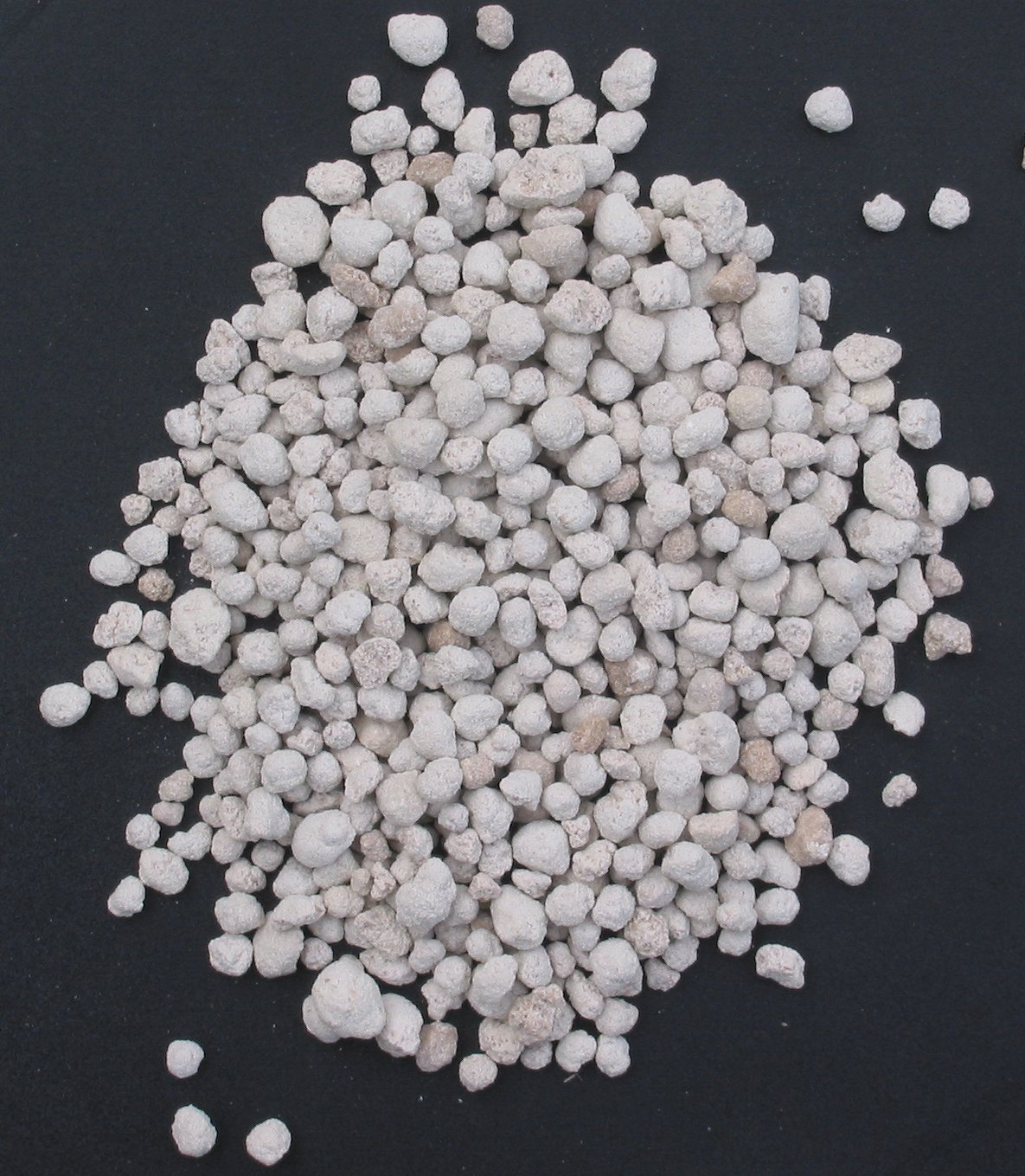 (Tripelsuperfosfaat) triple phosphate